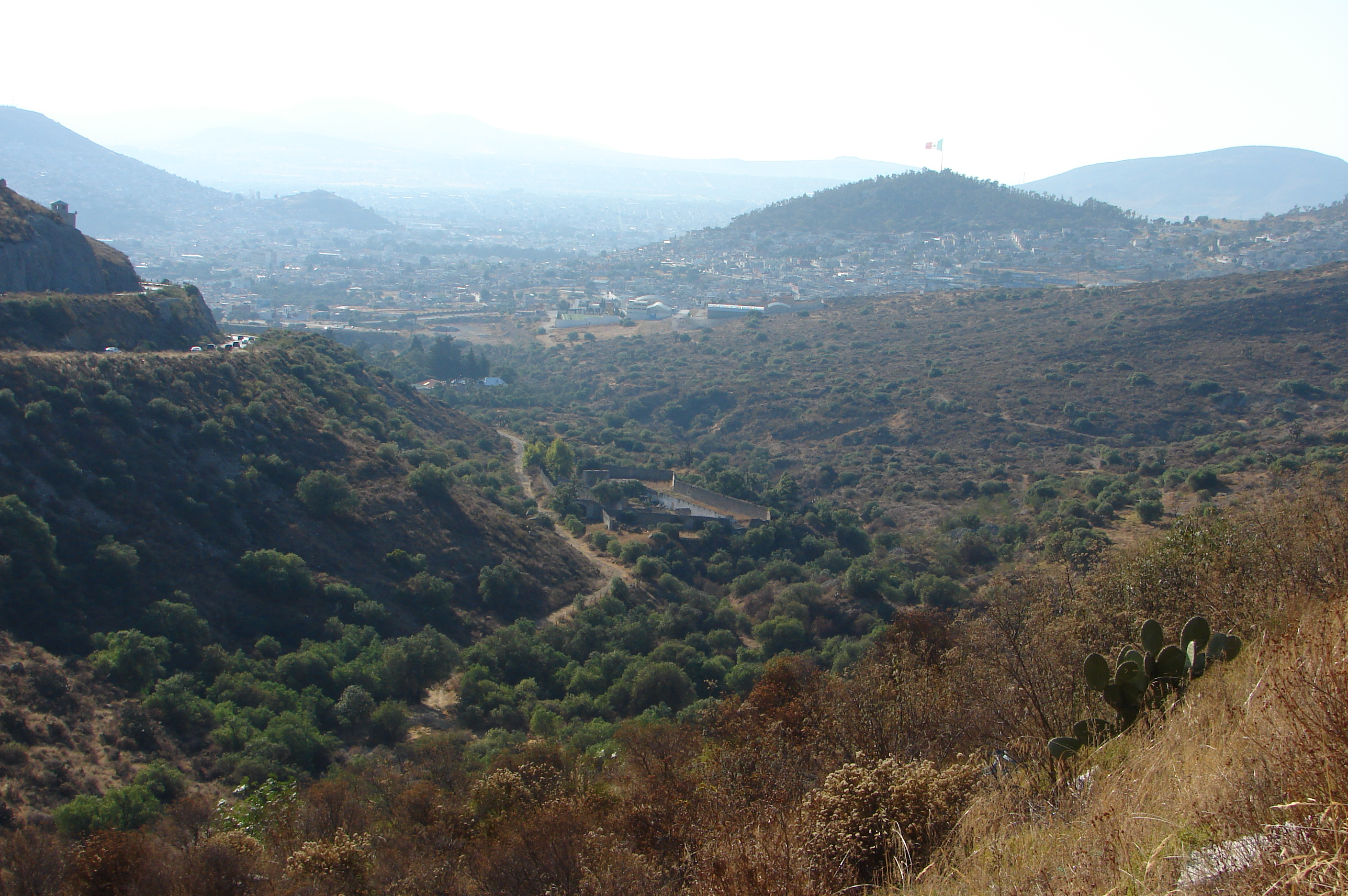 Panoramica de Pachuca desde la carretera que lleva a Real del Monte